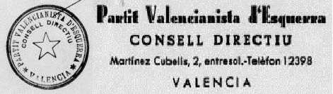 Fragment de la carta que el 28 de gener de 1937 envià el Partit Valencianista d'Esquerra al Conseller de Cultura de la Generalitat de Catalunya, Antoni Maria Sbert. S'aprecien els segells d'aquest partit valencianista.